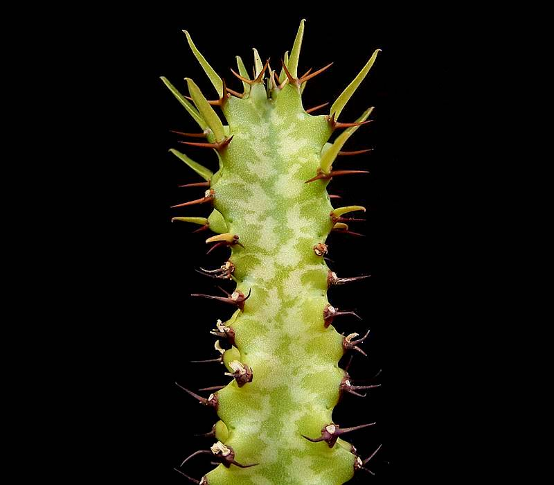 Euphorbia vallaris